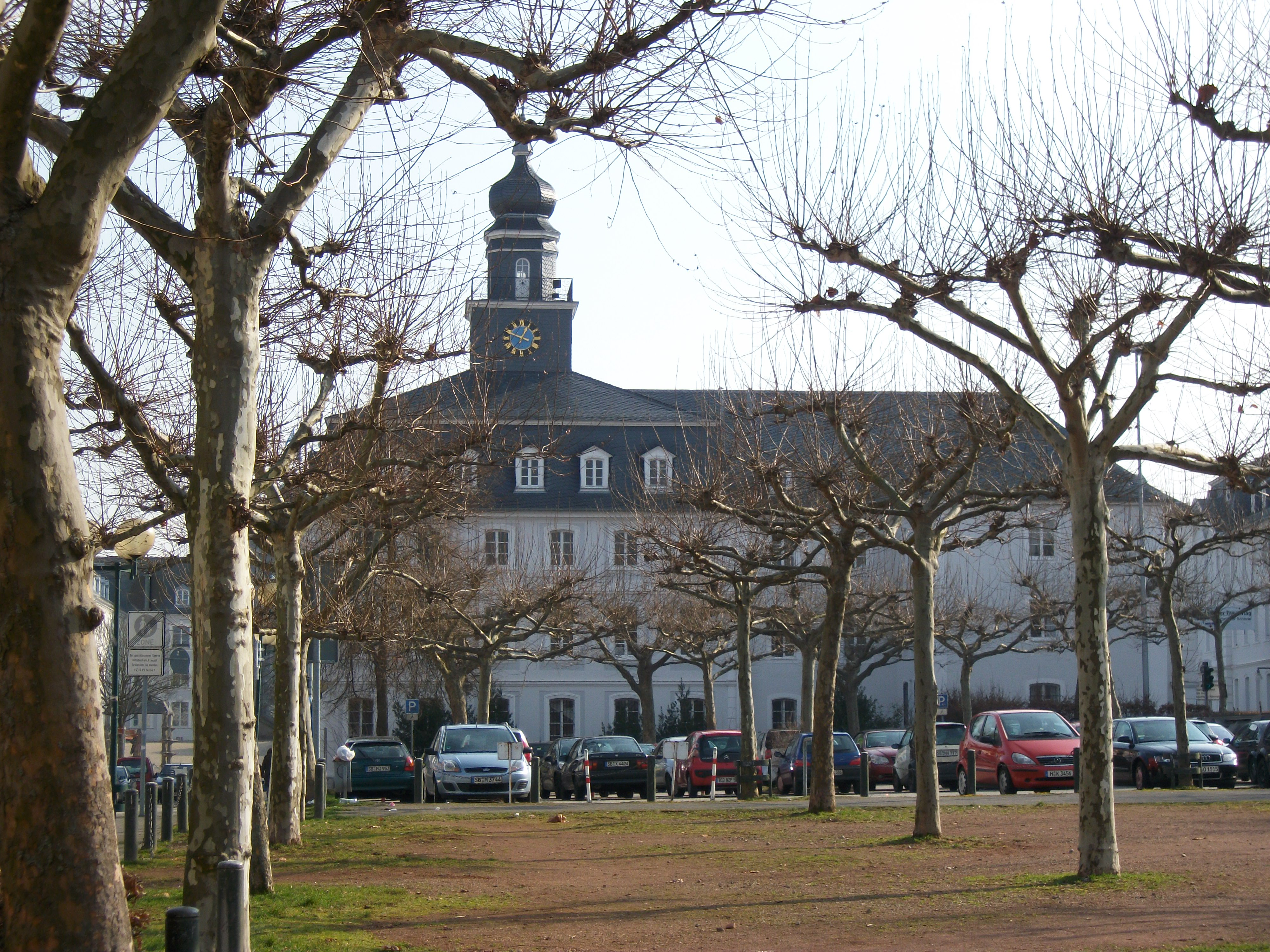 Altes Rathaus (Saarbrücken)